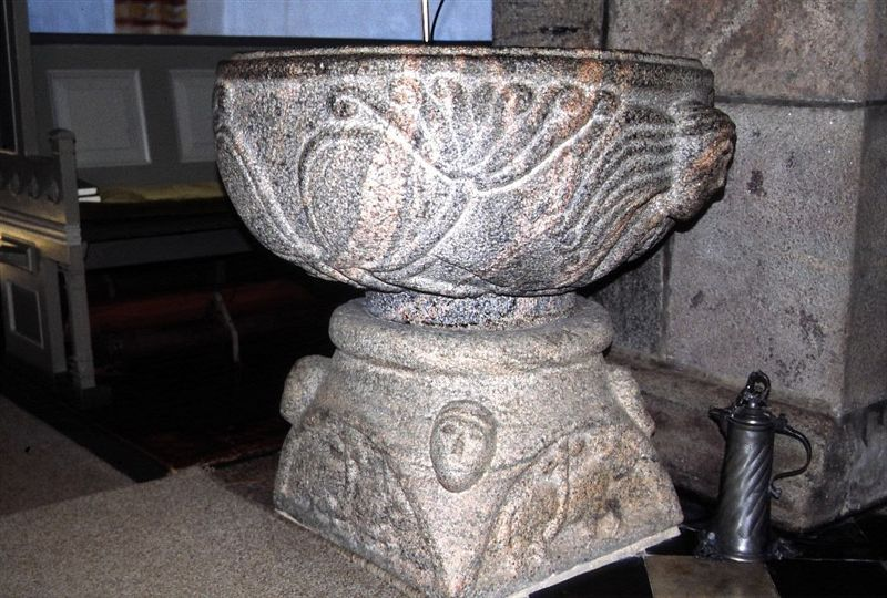 Vinderslev Kirke, Silkeborg Kommune, døbefont